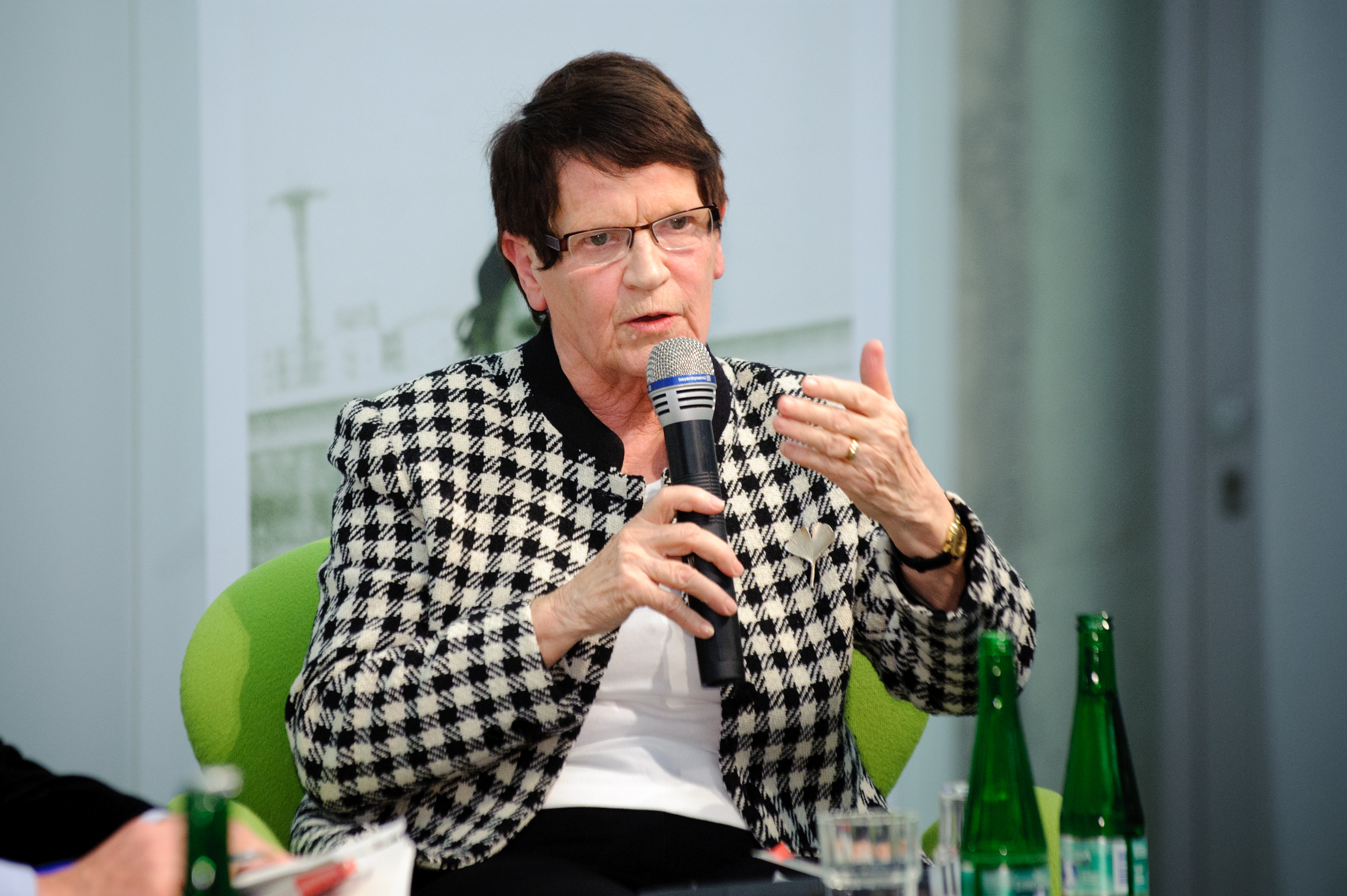 Prof. Dr. Rita Süssmuth (Bundestagspräsidentin a.D.) Foto: CC-BY-SA Stephan Röhl